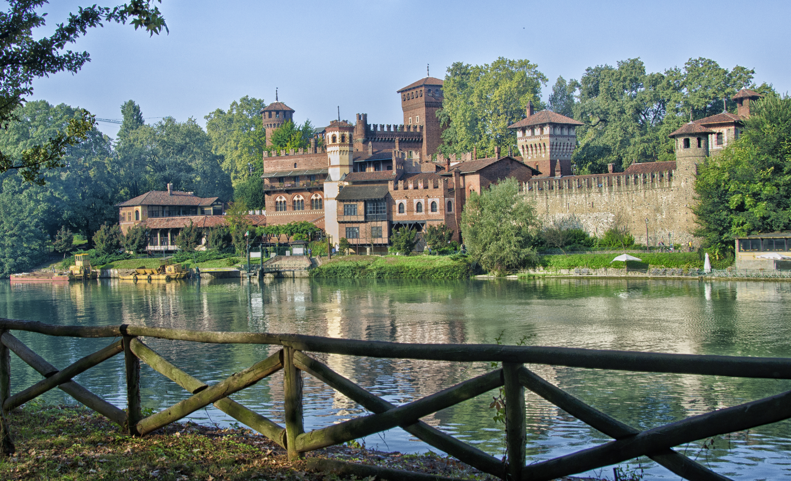 Borgo medioevale di Torino This is a photo of a monument which is part of cultural heritage of Italy.